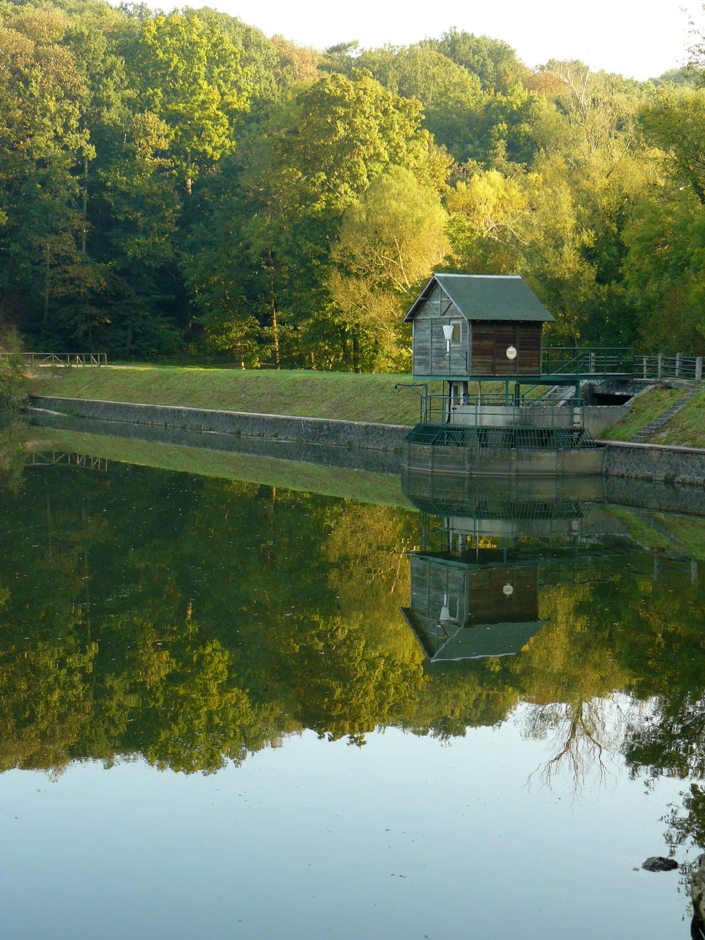 Etang de la Geneste à Buc (Yvelines, France)